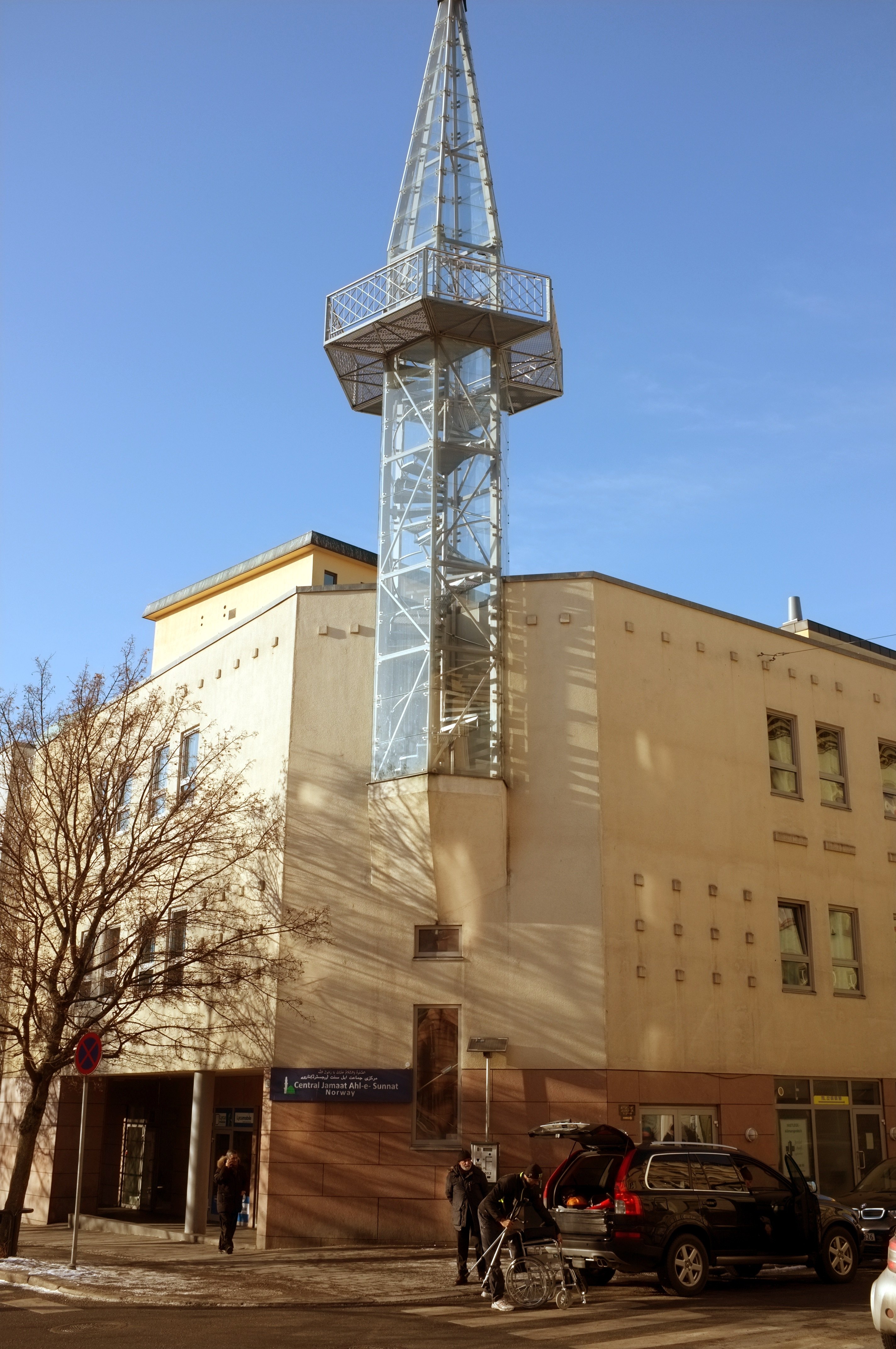 Central Jamaat-e Ahl-e Sunnat-moskeen i Oslo.